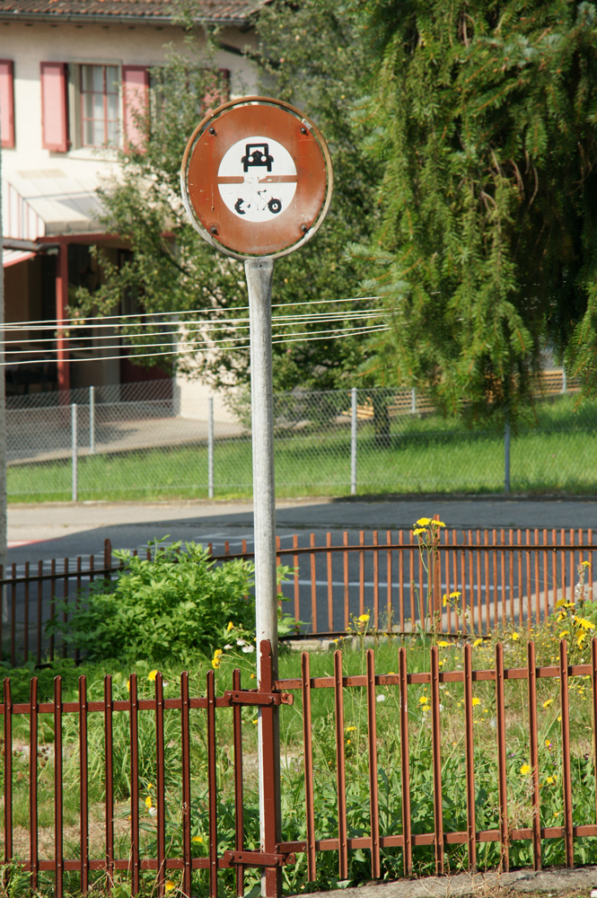 Signal "Nr. 12: Fahrverbot für Motorfahrzeuge" gemäss "Verordnung über die Strassensignalisation vom 17. Oktober 1932" in Kleinwangen Luzern